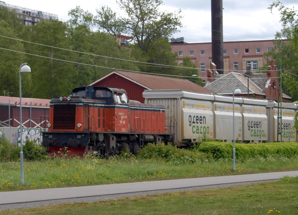 T43 221 der Inlandsbahn in Östersund, Schweden